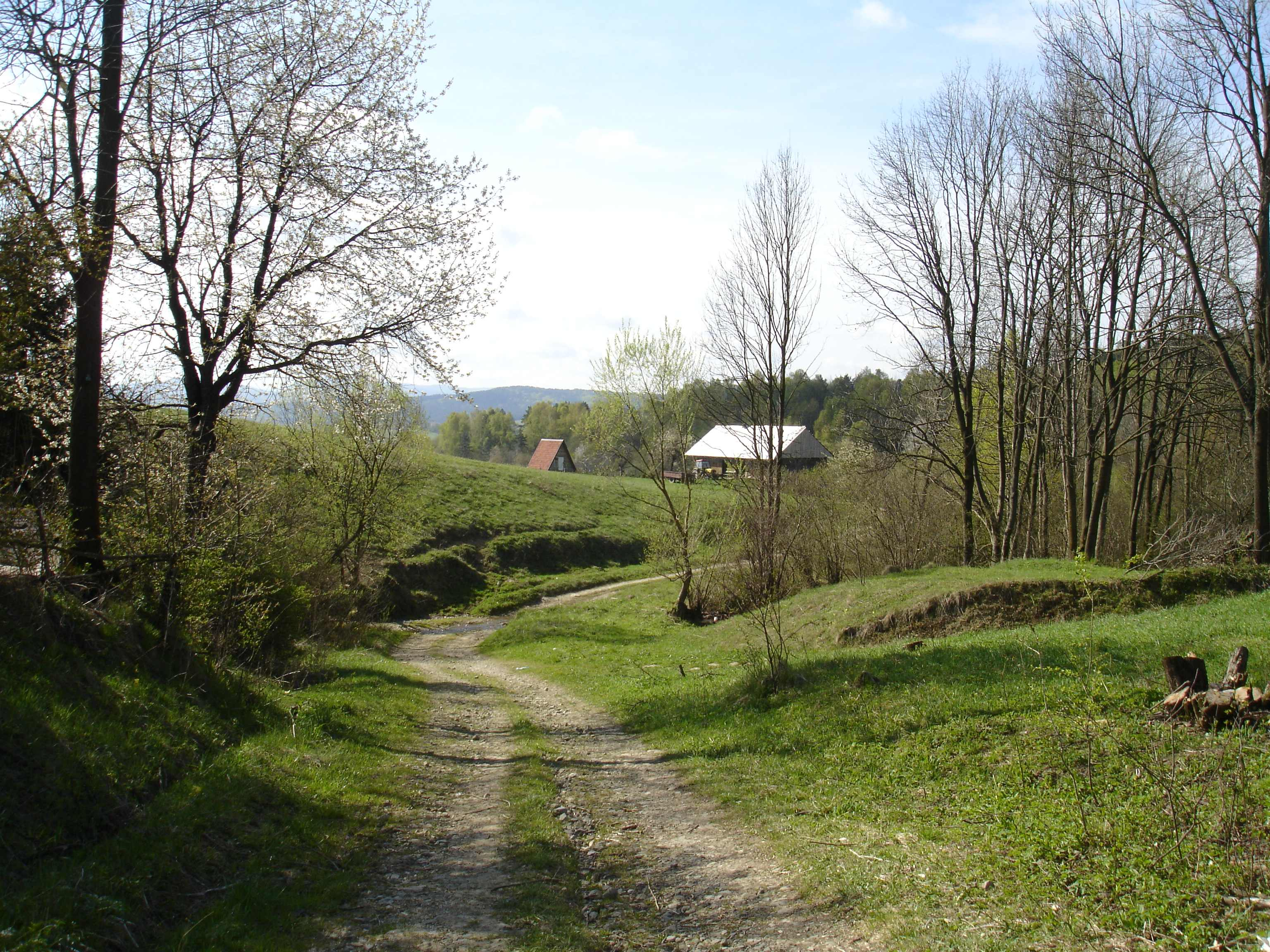 Village Kamienne